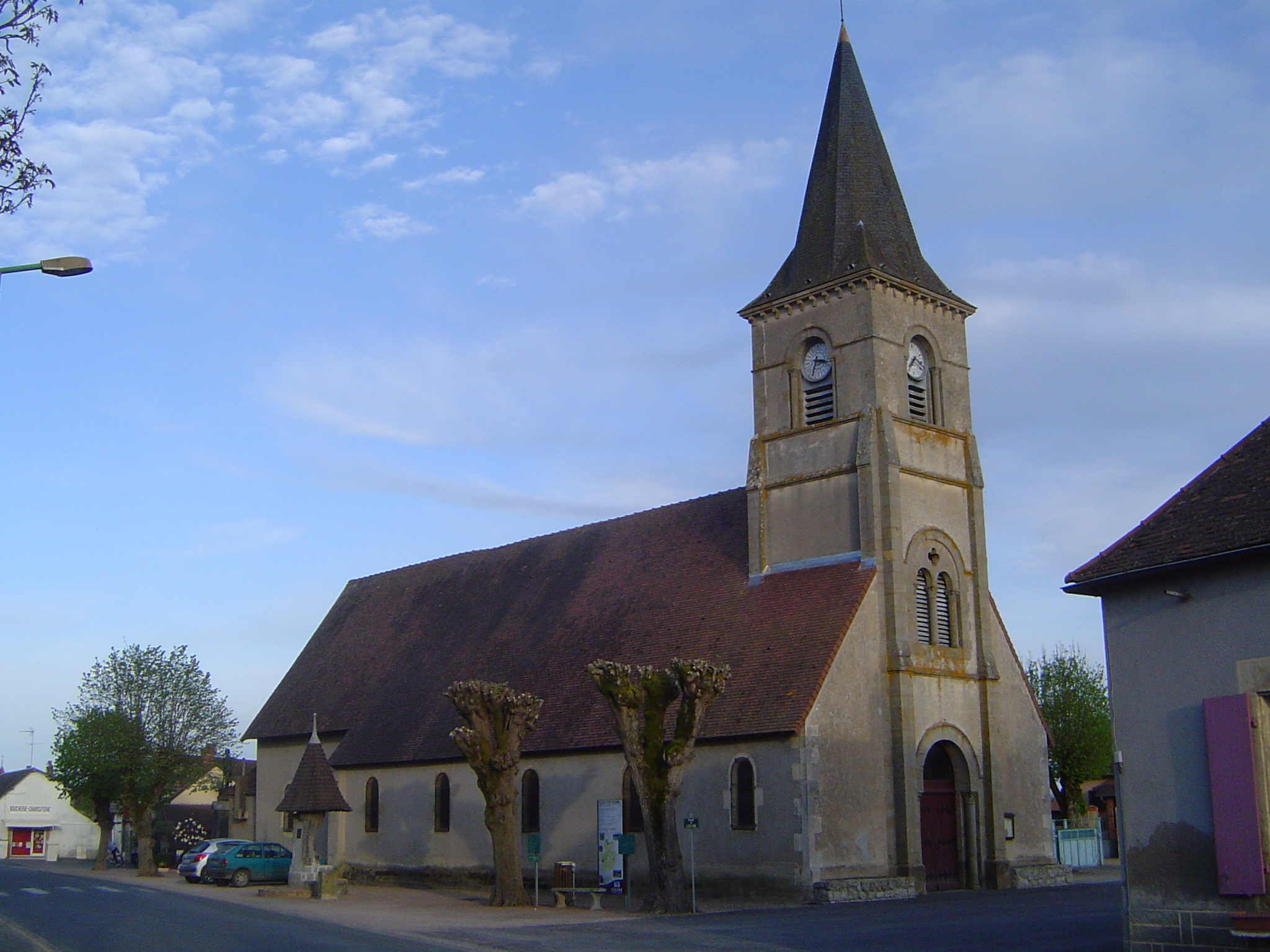 Gannay-sur-Loire (église)